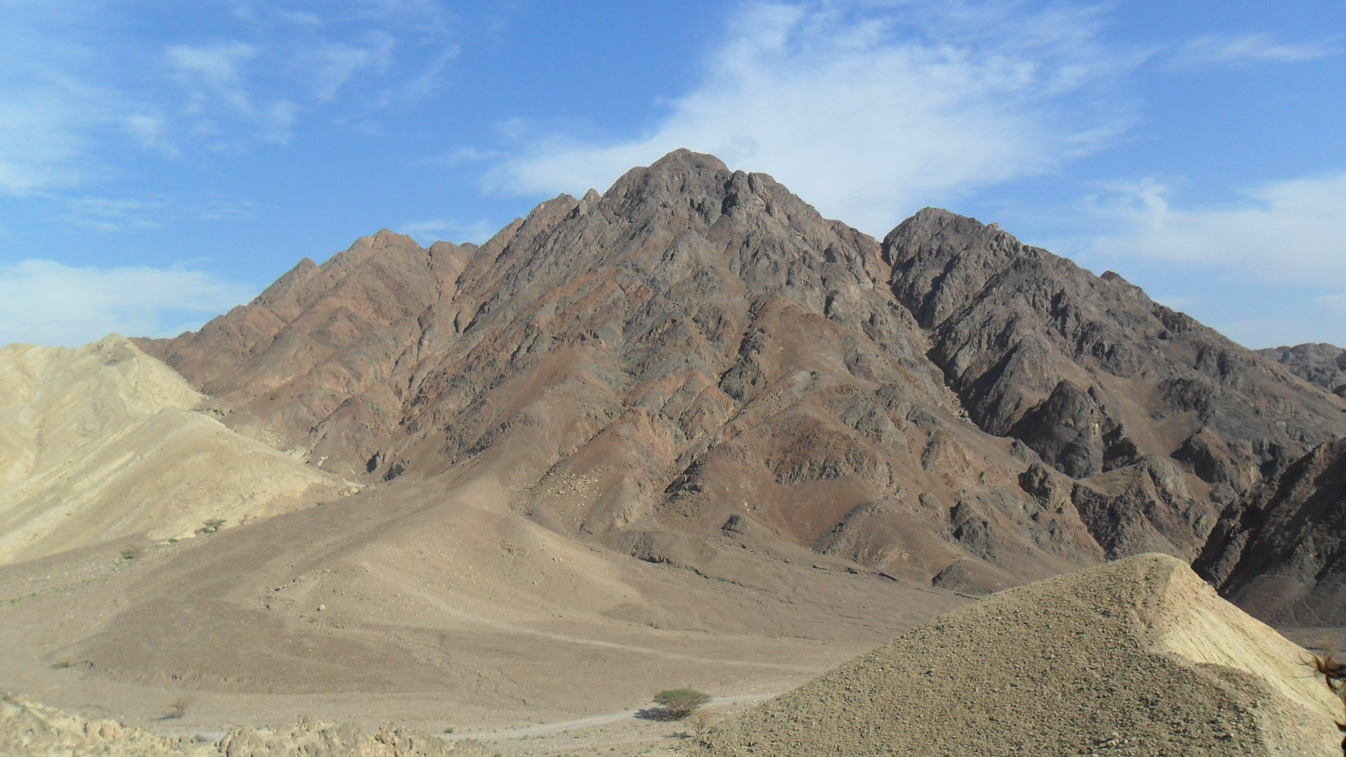 הר יהושפט